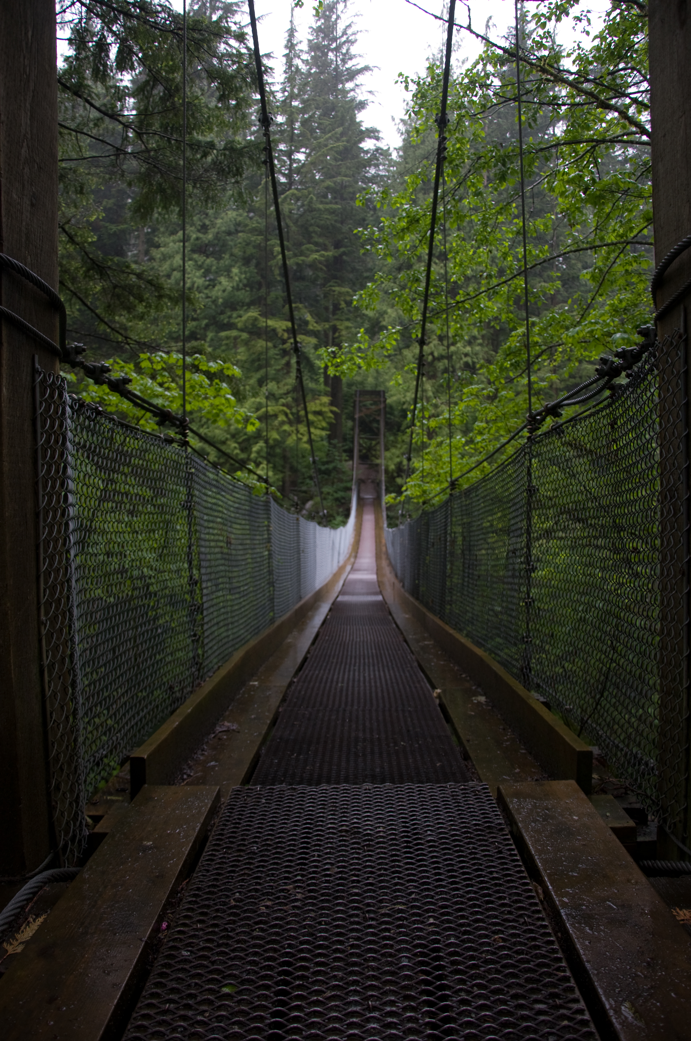 Diez Vista Walk